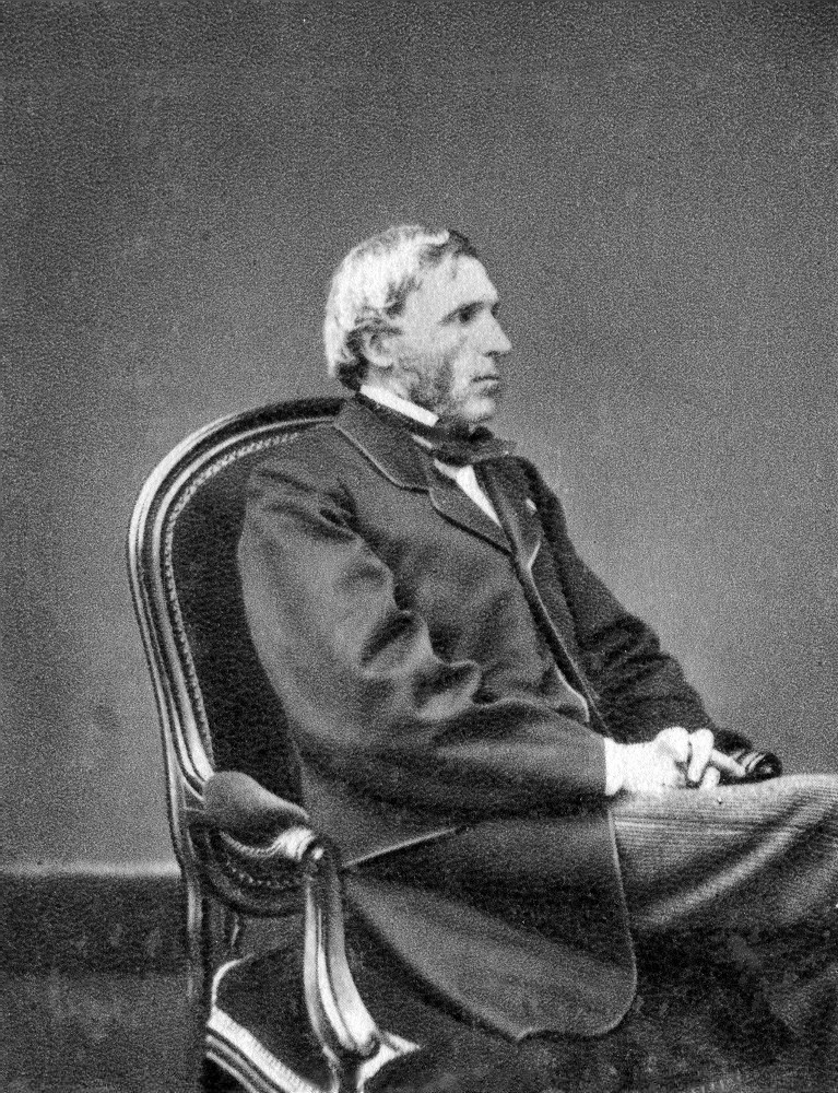 Joseph Louis Gay-Lussac